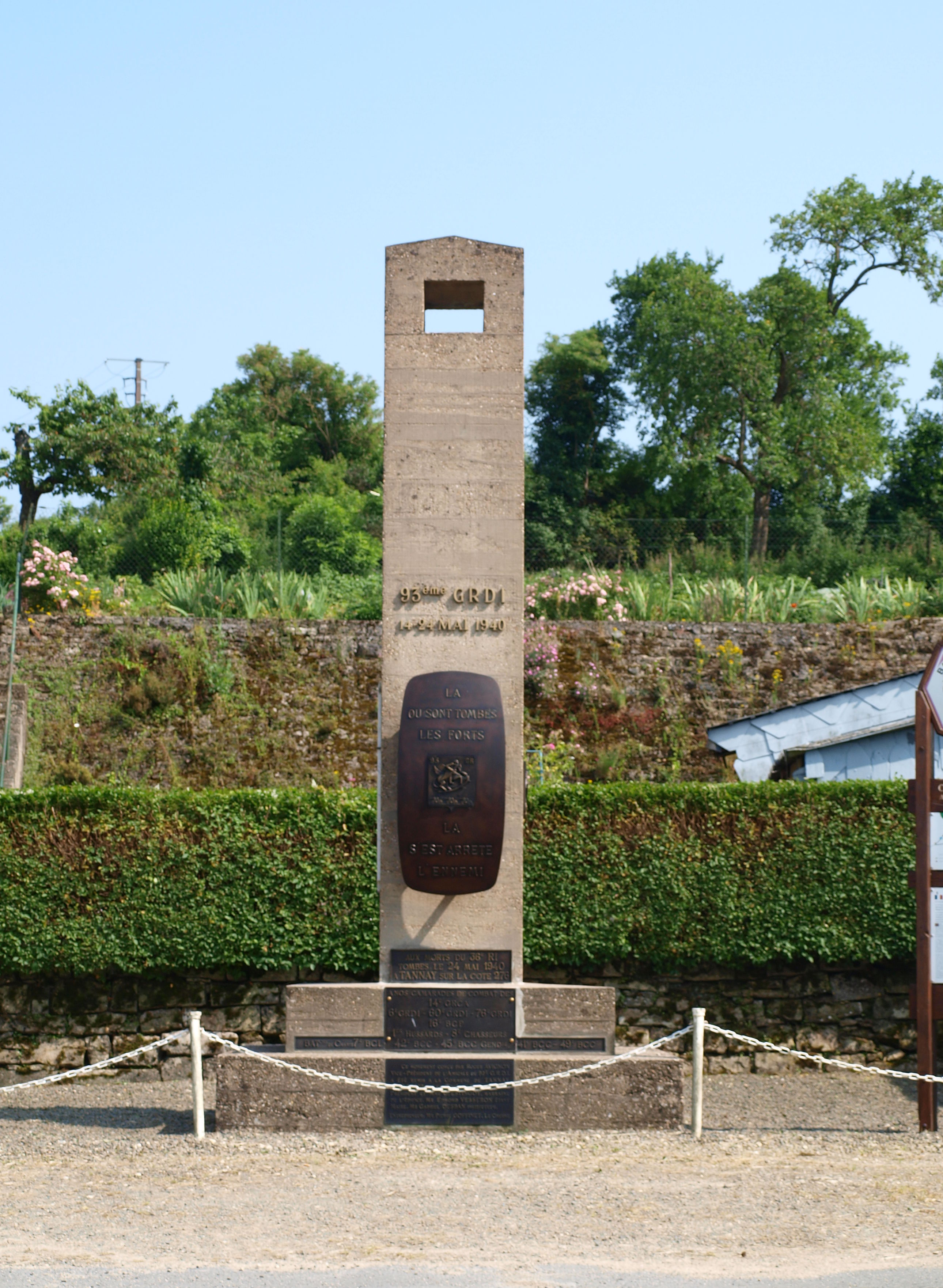 Tannay (Ardennes, France) ; monument au 93e GRDI